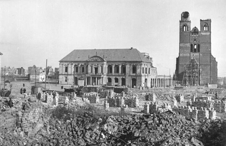 Magdeburg 1952, Rathaus, Johanniskirche, Ruinen Zentralbild Rösener 24.3.1952 Magdeburg baut auf. Sonntags helfen die Magdeburger mit, ihre Heimatstadt zu enttrümmern. UBz: Rings um das Magdeburger Rathaus (rechts) ist eine riesige Steinwüste, die enttrümmert wird. Leihweise Zentral